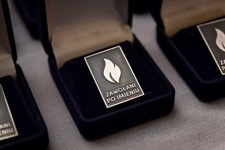 Odznaczenie przyznawane post mortem przez Instytut Pileckiego w ramach projektu "Zawołani po imieniu" potomkom obywateli polskich zamordowanych za niesienie pomocy Żydom w czasie okupacji niemieckiej.